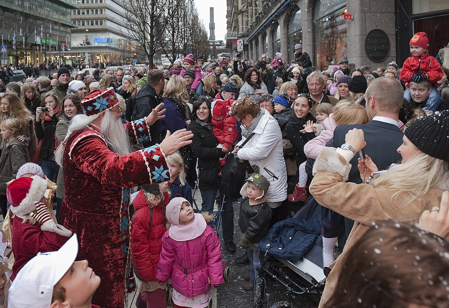 Skyltsöndag på Nordiska Kompaniet i Stockholm